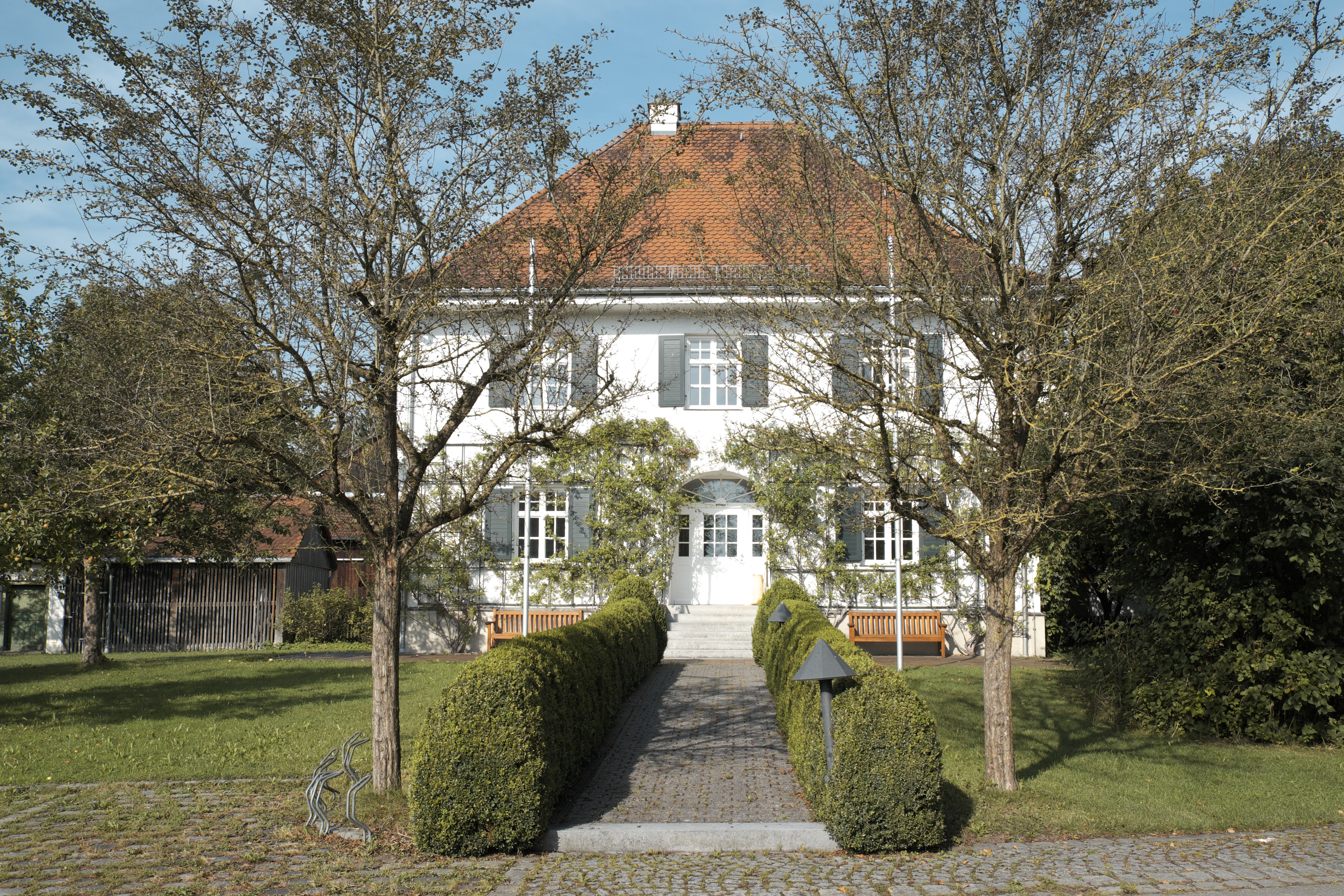 Ehemaliges Pfarrhaus in Kottgeisering im Landkreis Fürstenfeldbruck (Bayern/Deutschland)